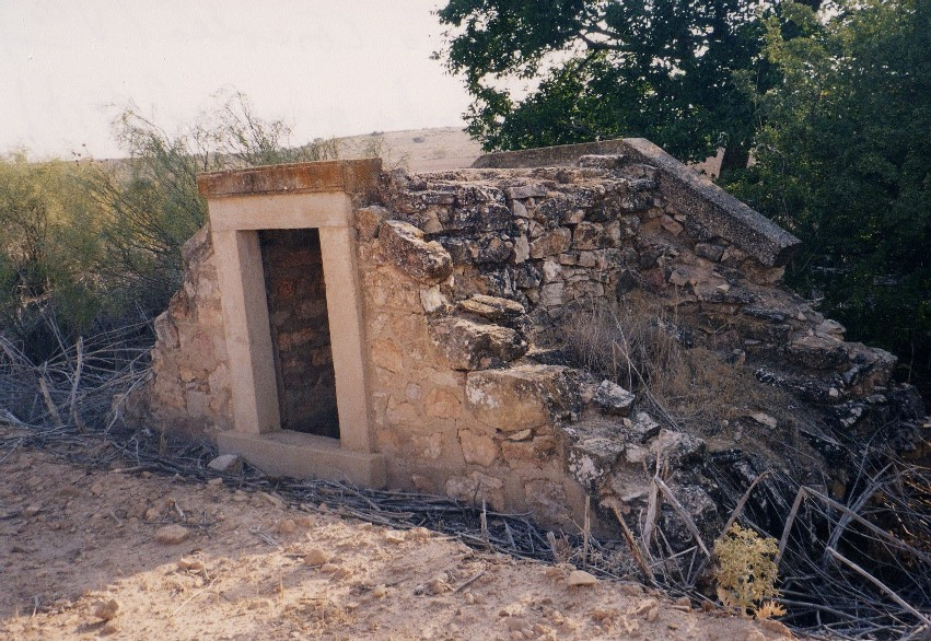 Imagen del cimbre de una zanja cimbrada (calzadizo), junto a la margen izquierda del río Córcoles.